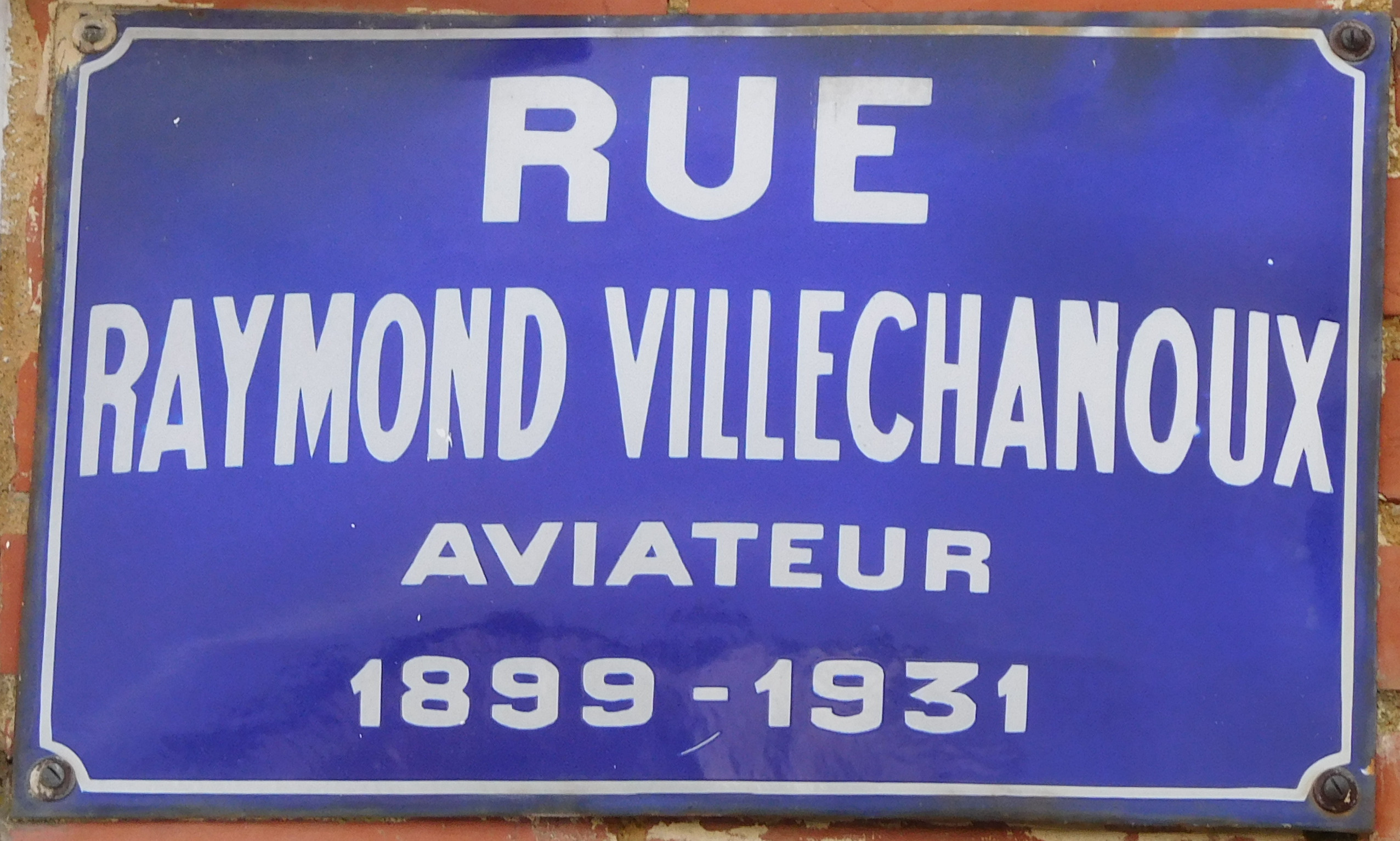 Plaque « Rue Raymond Villechanoux, Aviateur, 1899 - 1931 » ; en face de la gare de Mussidan, Dordogne, France.